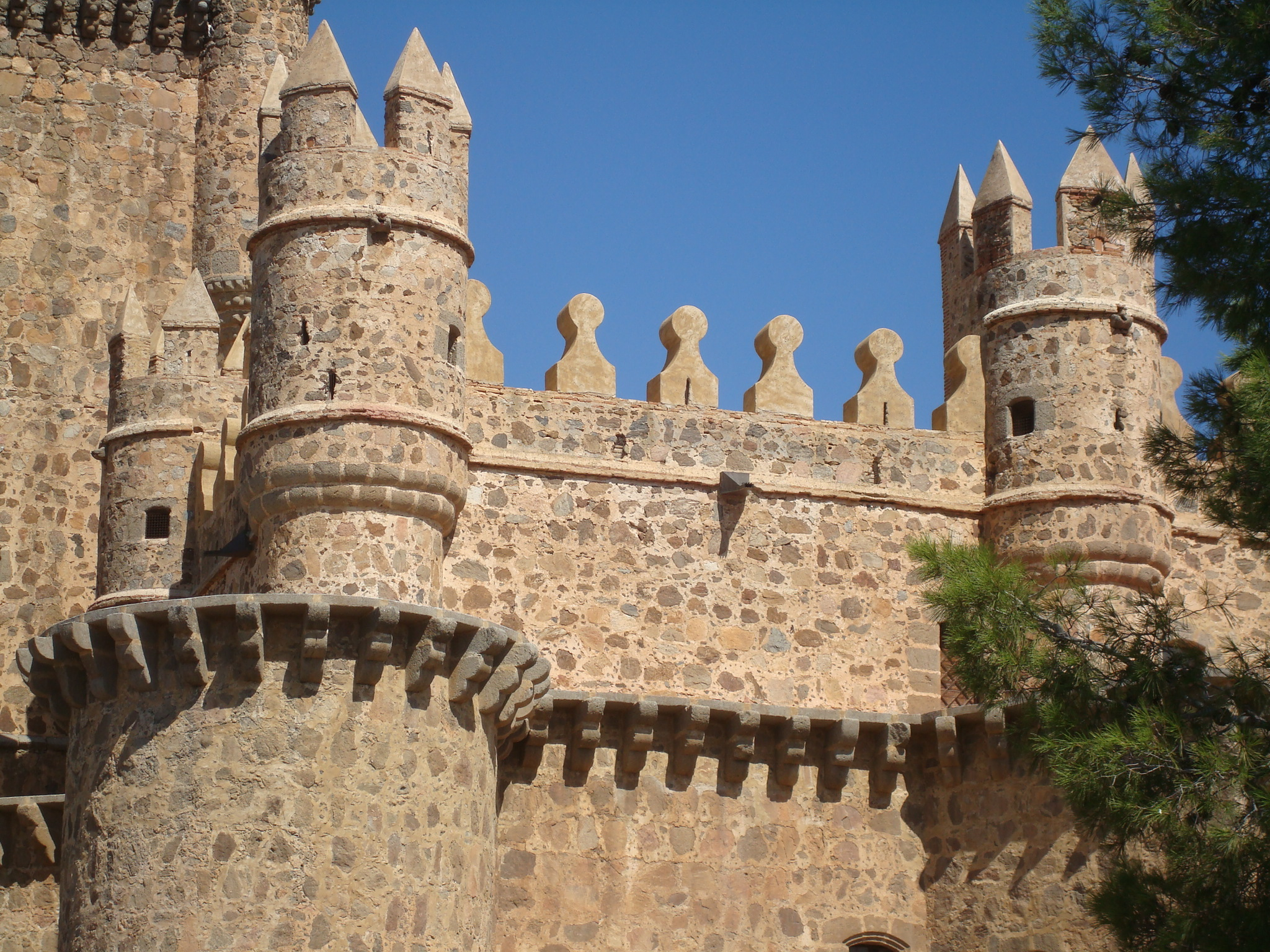 Detalle de las almenas del castillo de Guadamur (Toledo).